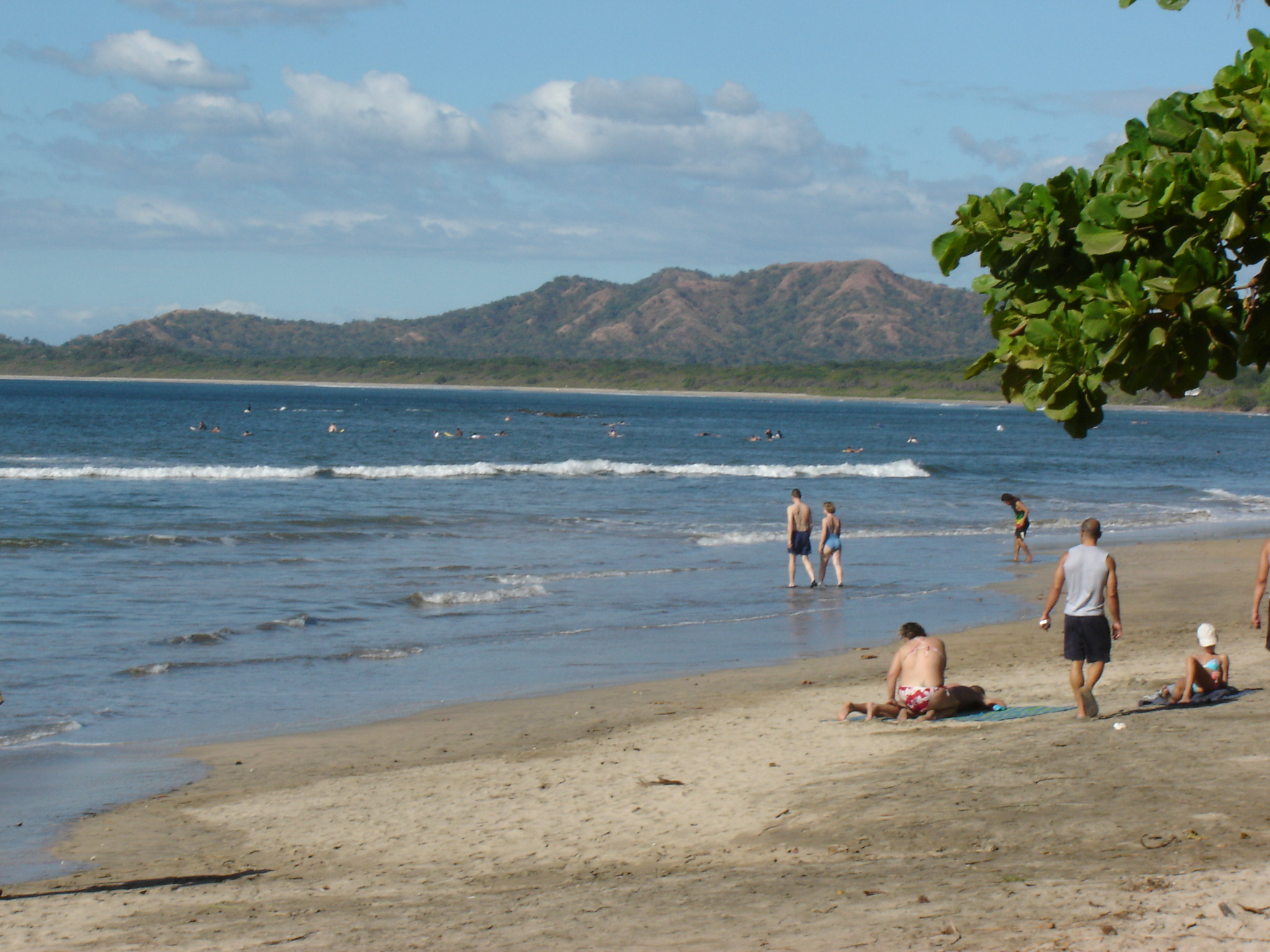 Playa Tamarindo, Guanacaste, Costa Rica